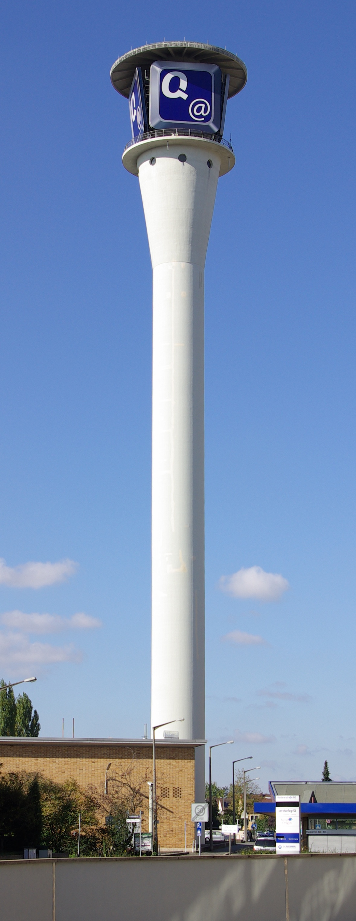 Quelleturm im Nürnberger Stadtteil Eberhardshof.